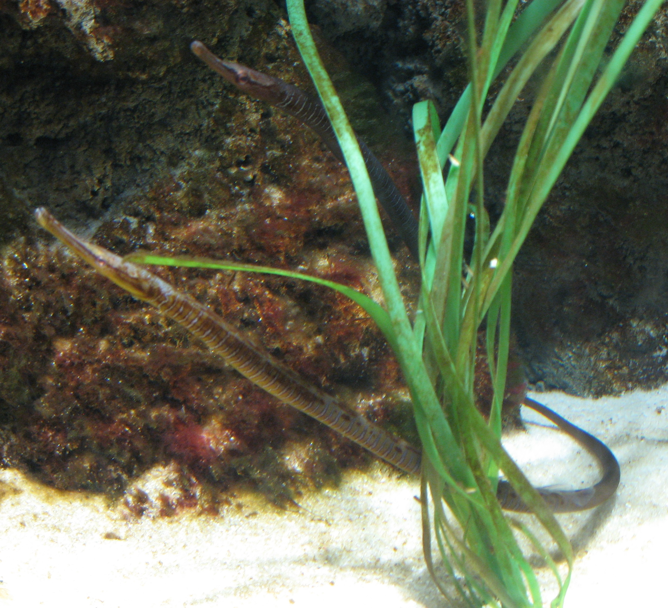 Entelurus aequoreus in Aquarium Cinéaqua Map: 48° 51' 44" N 2° 17' 27" E